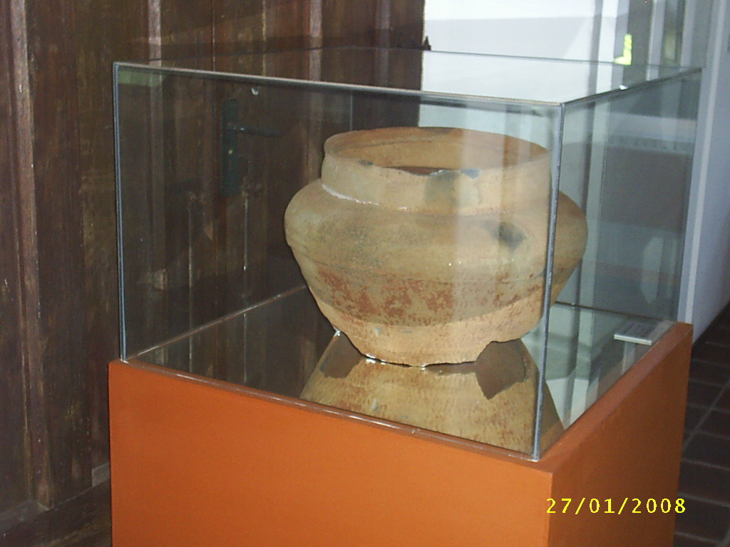 Urna funeraria guaraní